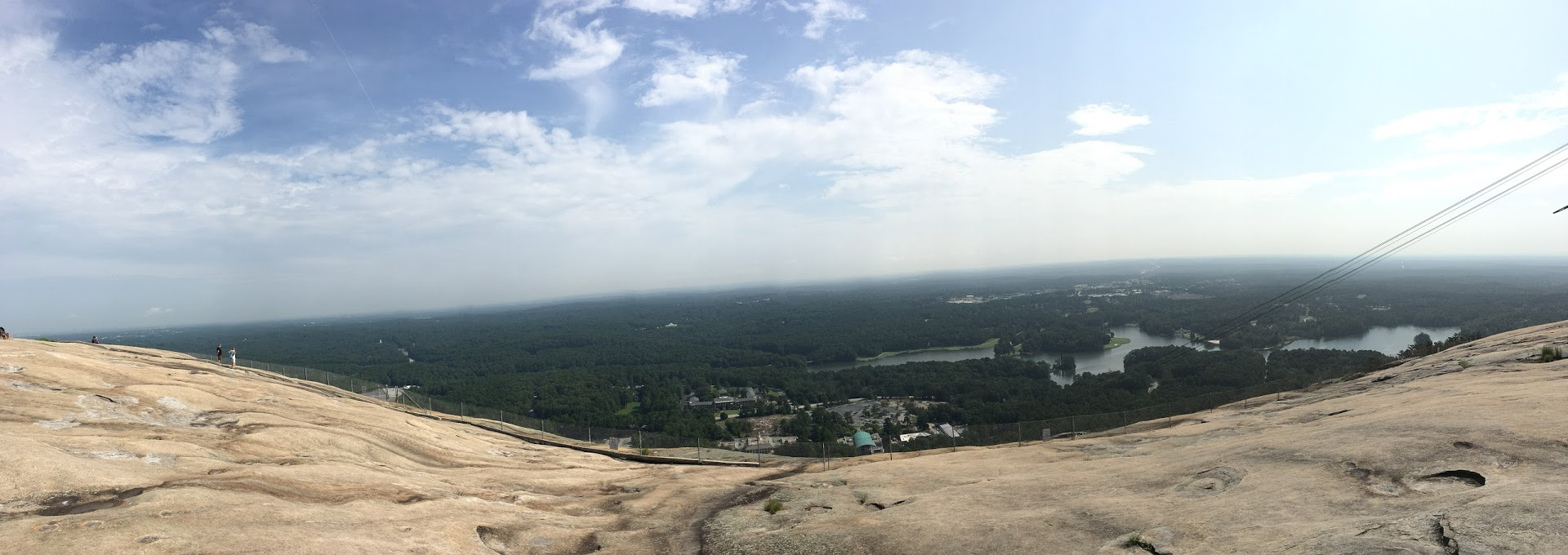 Billede fra Stone Mountain